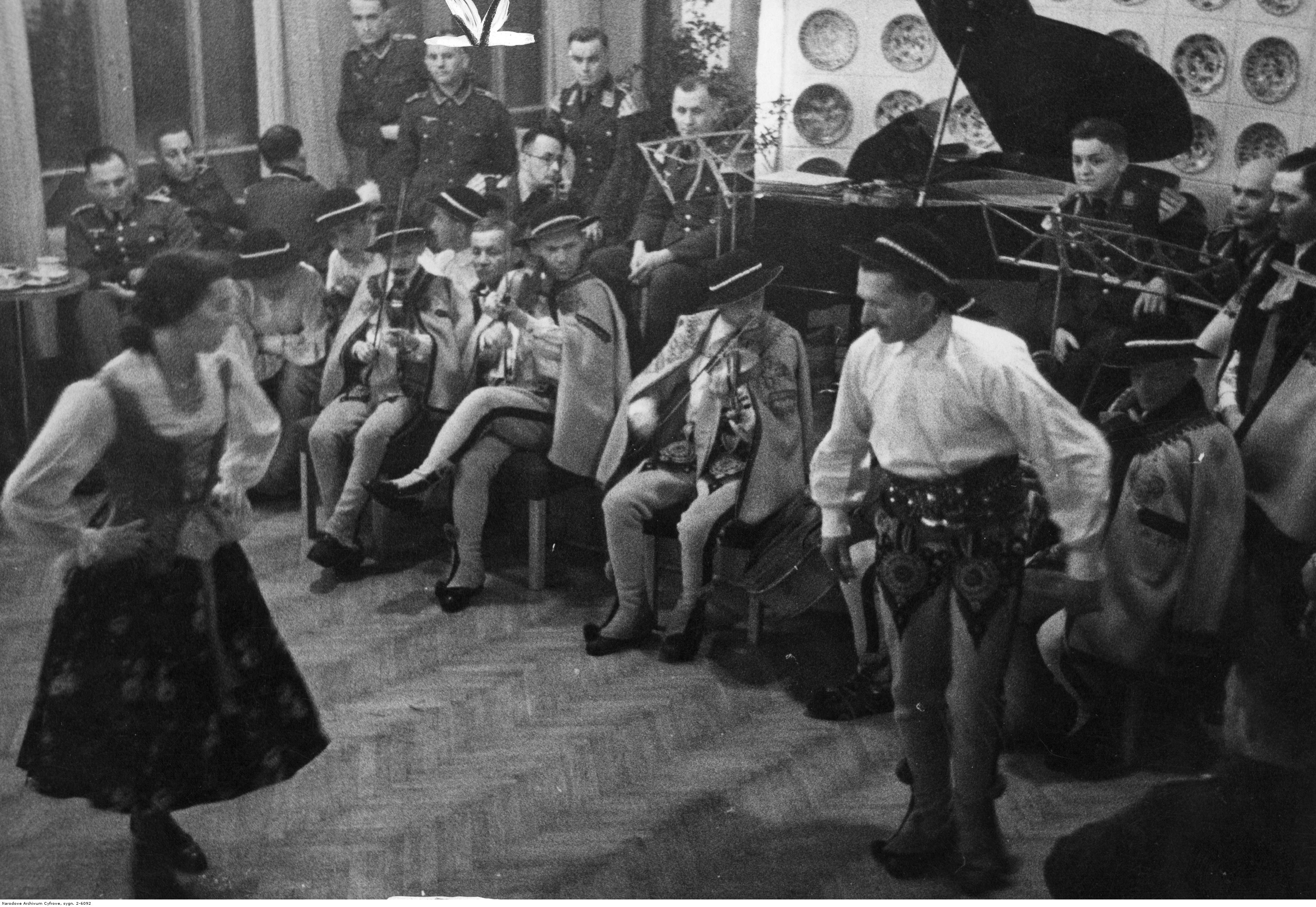 Występ taneczny górali dla żołnierzy niemieckich (zakład fotograficzny Otto Rosnera)